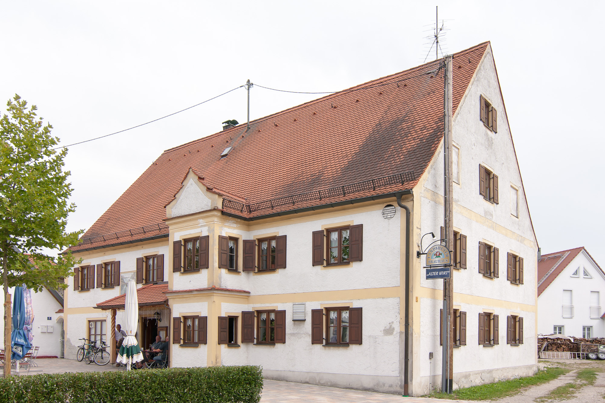 Gasthaus zum Alten Wirt; 17./18. JahrhundertThis is a photograph of an architectural monument.